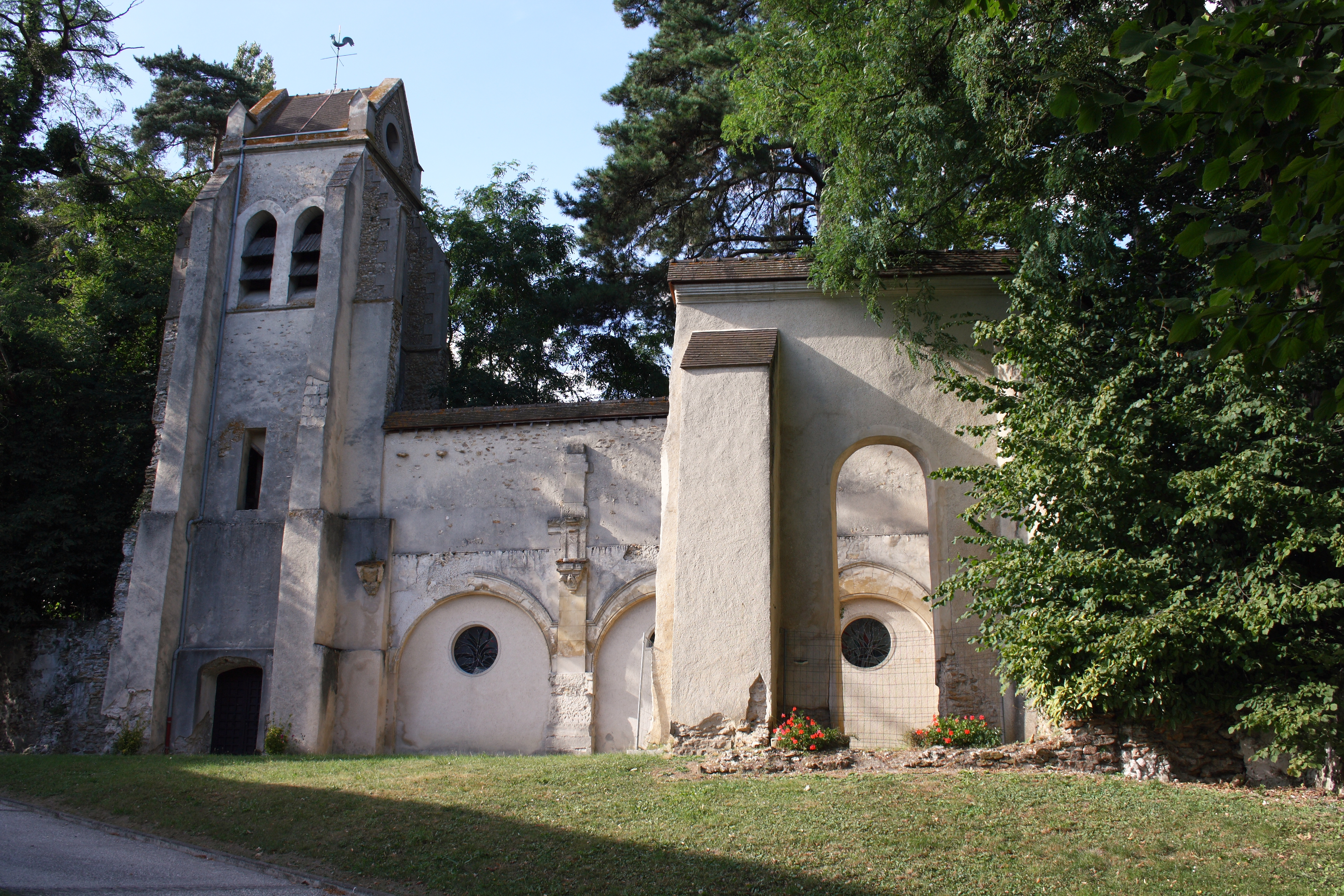 Kirche in Piscop im Département Val-d’Oise (Île-de-France)